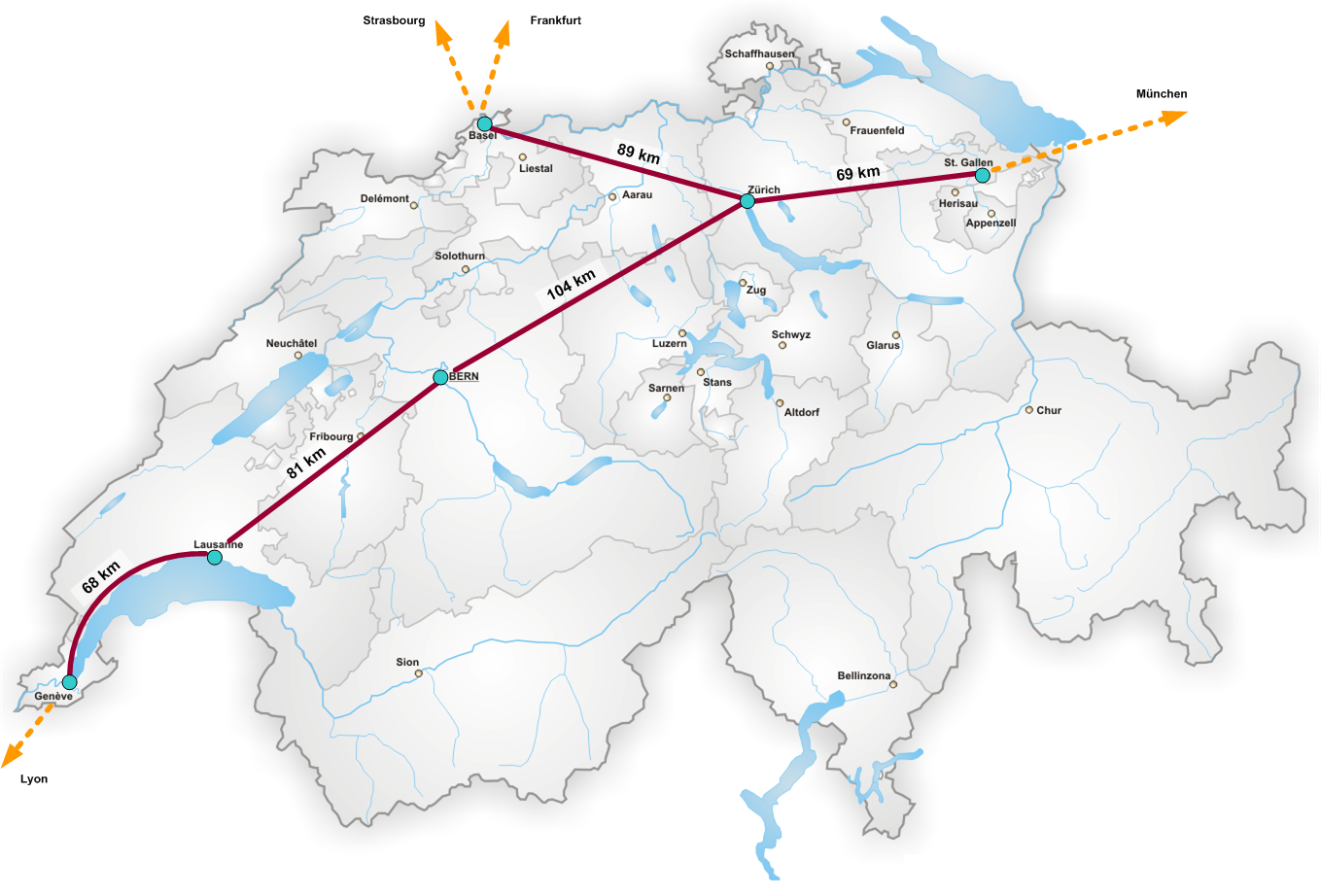 Swissmetro Network 2005